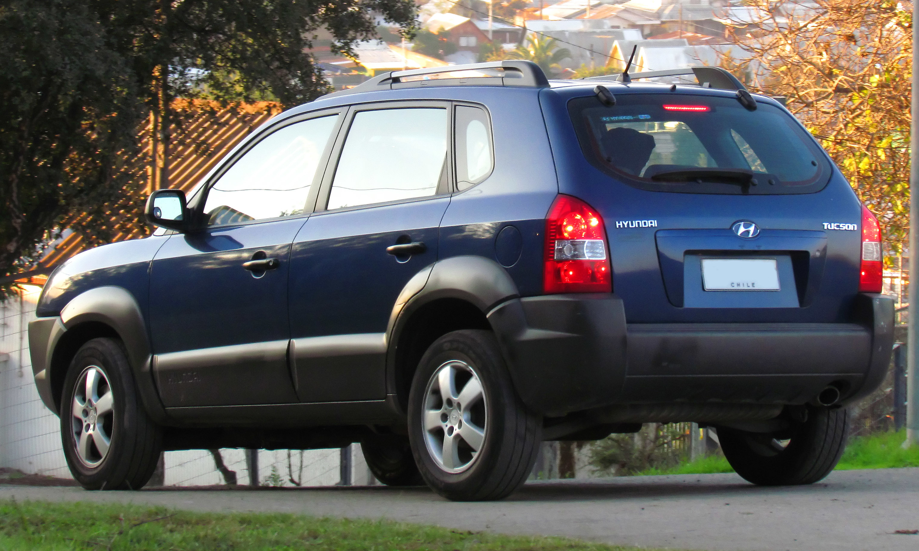 Hyundai Tucson GL 2.0 2006